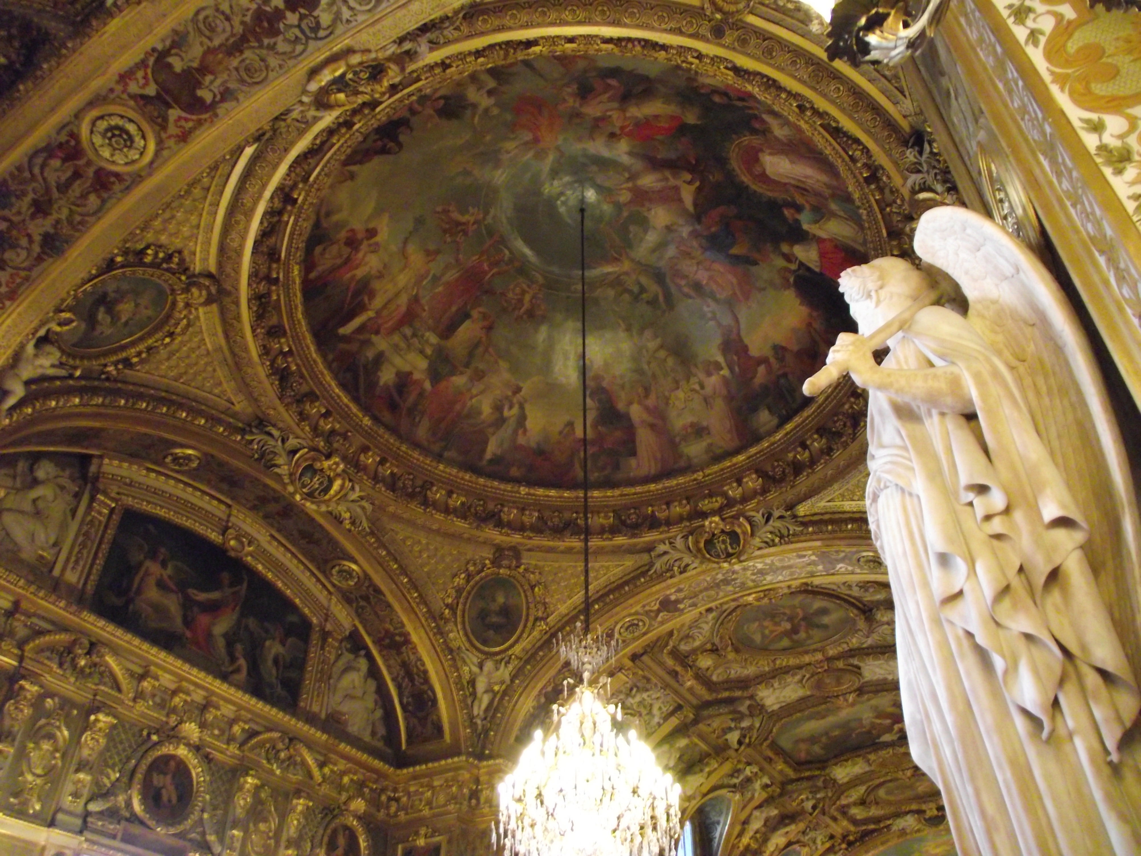 Paris, Palais du Luxembourg, Salle des Conférences